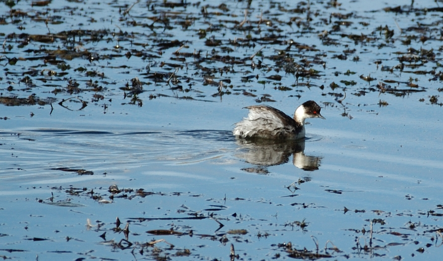 Silvery Grebe (Podiceps occipitalis juninensis) swimming. Laguna Lagunillas, Puno, Peru 19.06.08